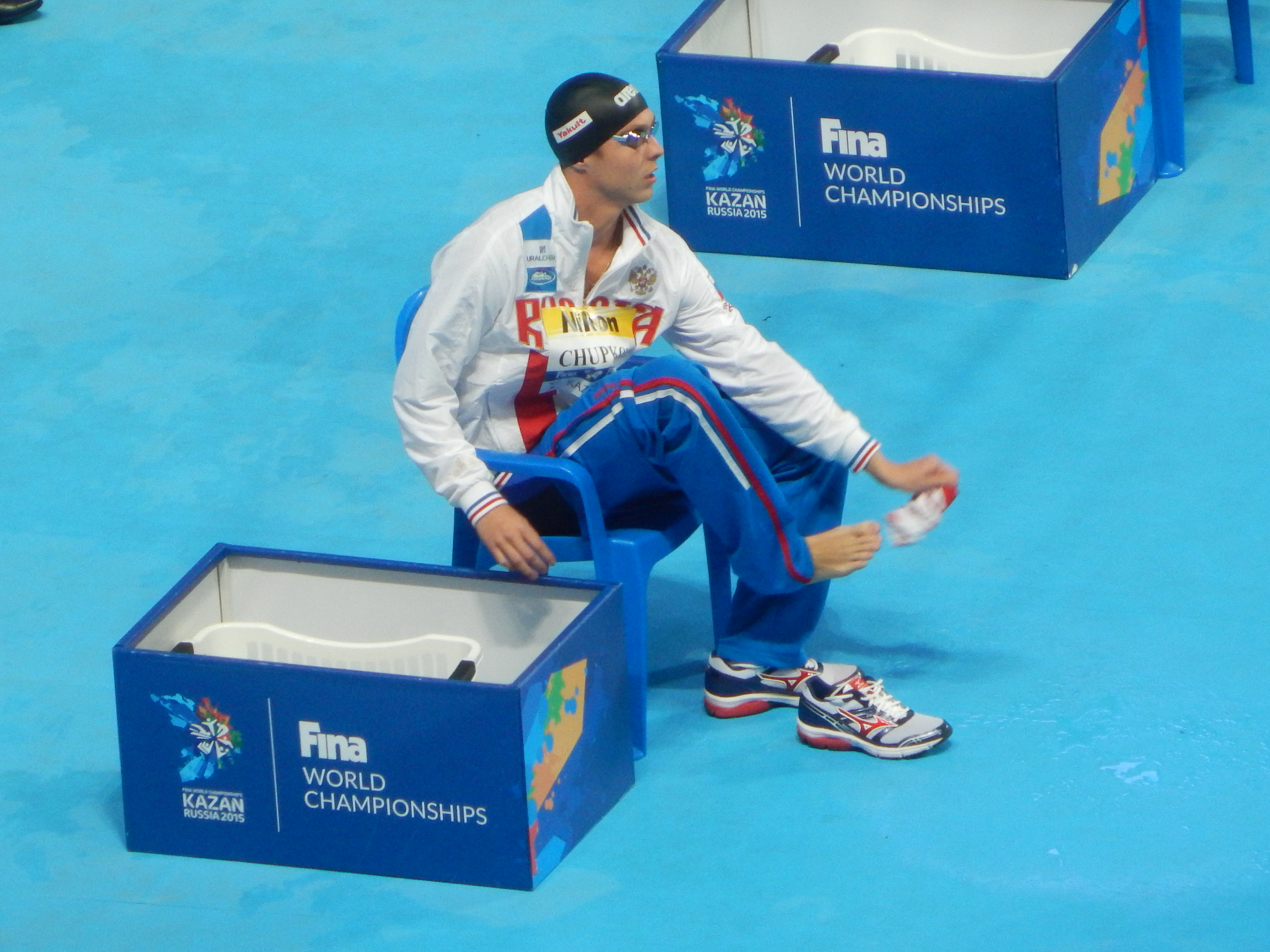 Антон Чупков на чемпионате мира в Казани